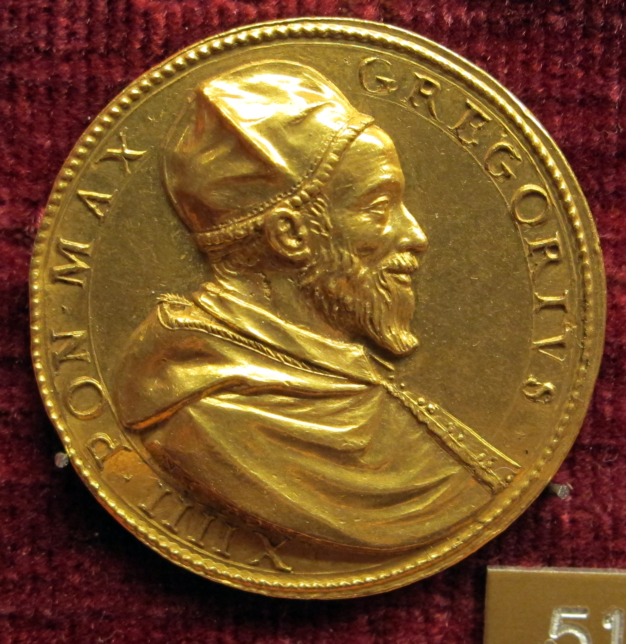 Medaglia papale